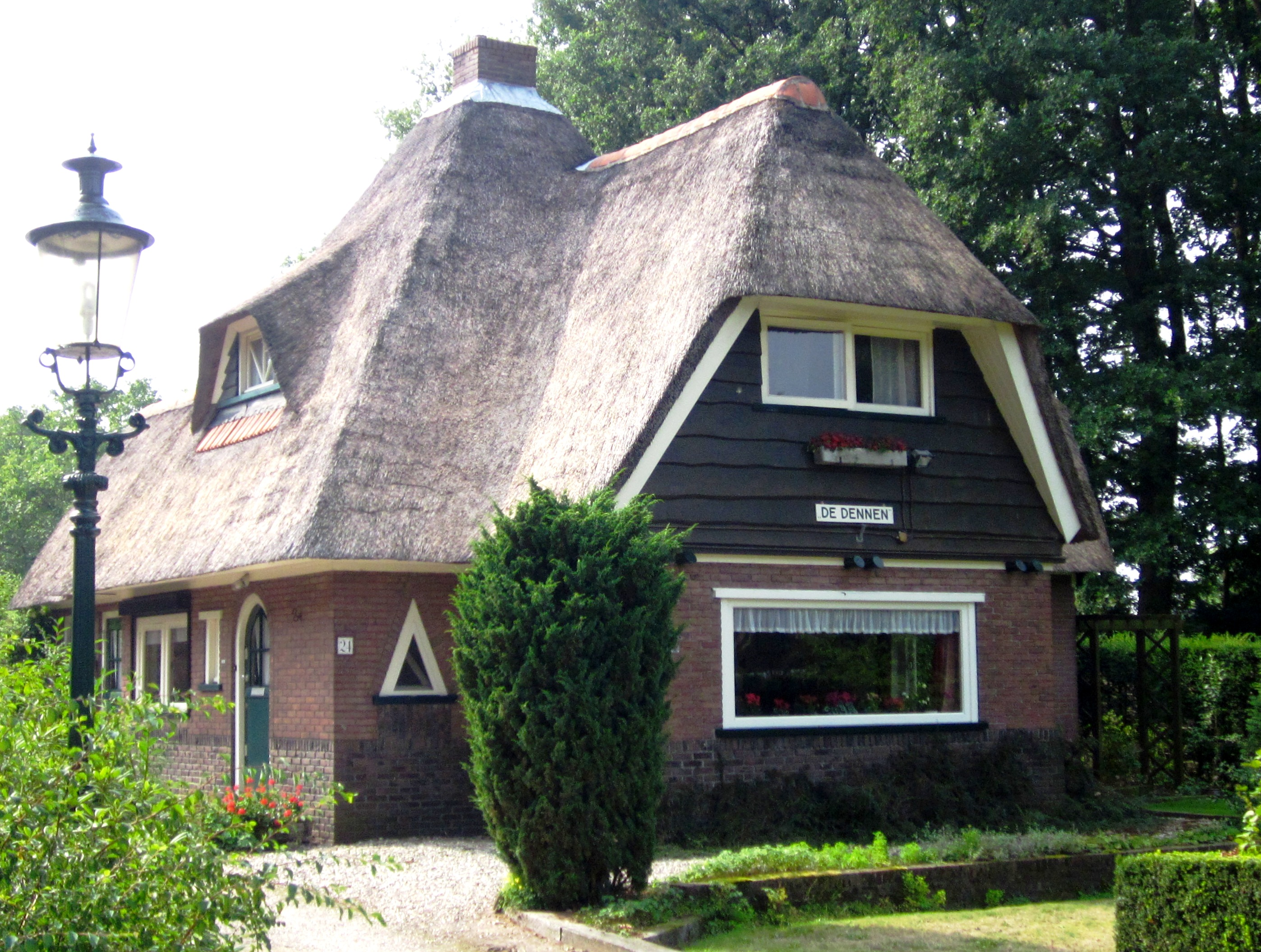 Villa 'De Dennen' in het buitengebied van Diepenveen